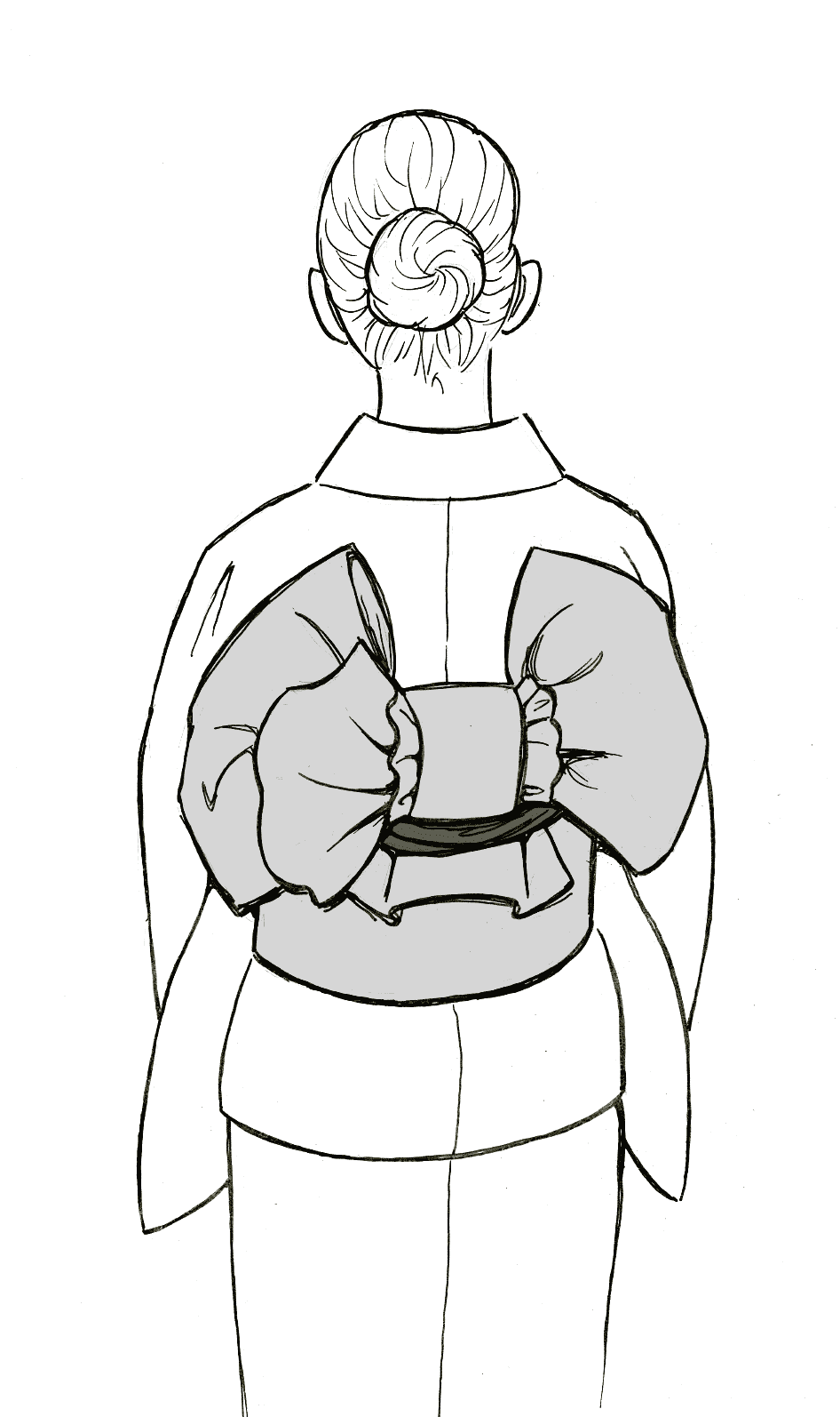 Washikusa musubi, related: obi, kimono, kitsuke